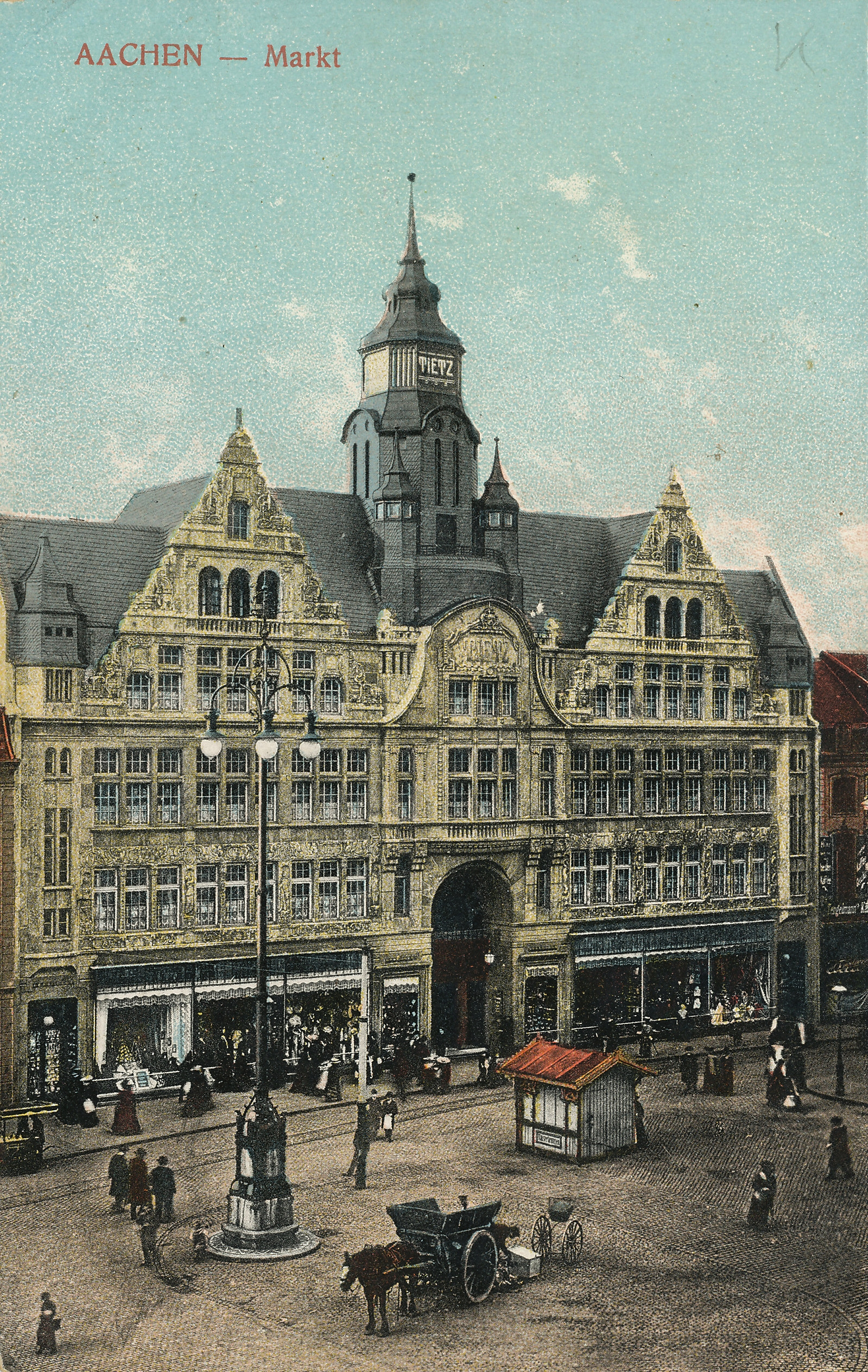 Neubau des Kaufhauses LeonhardTietz am Aachener Markt, erbaut 1906